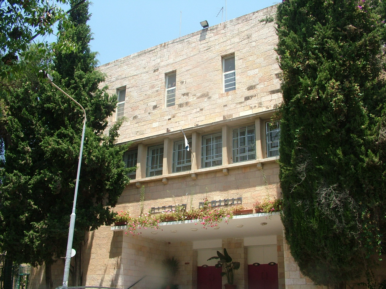 The Gimnasia Rehavia, Jerusalem, Israel